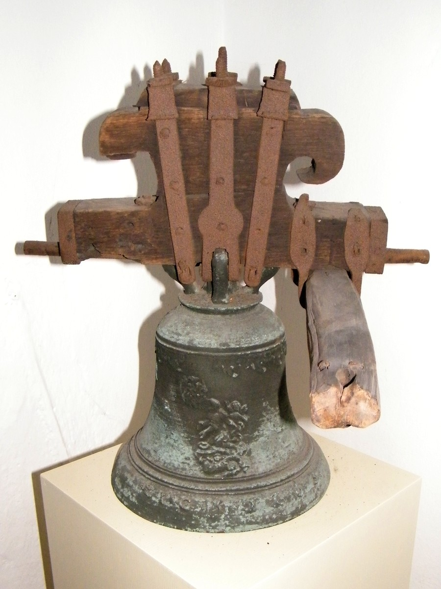 Zvon z kostela svatého Martina v Brtníkách